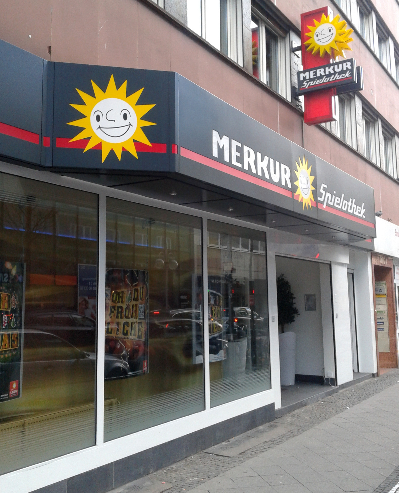 Merkur Spielothek in Mannheim, O6, 24 (Kunststraße)